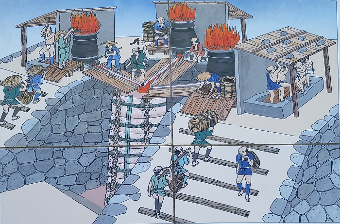 郡司鋳造所作業想像図